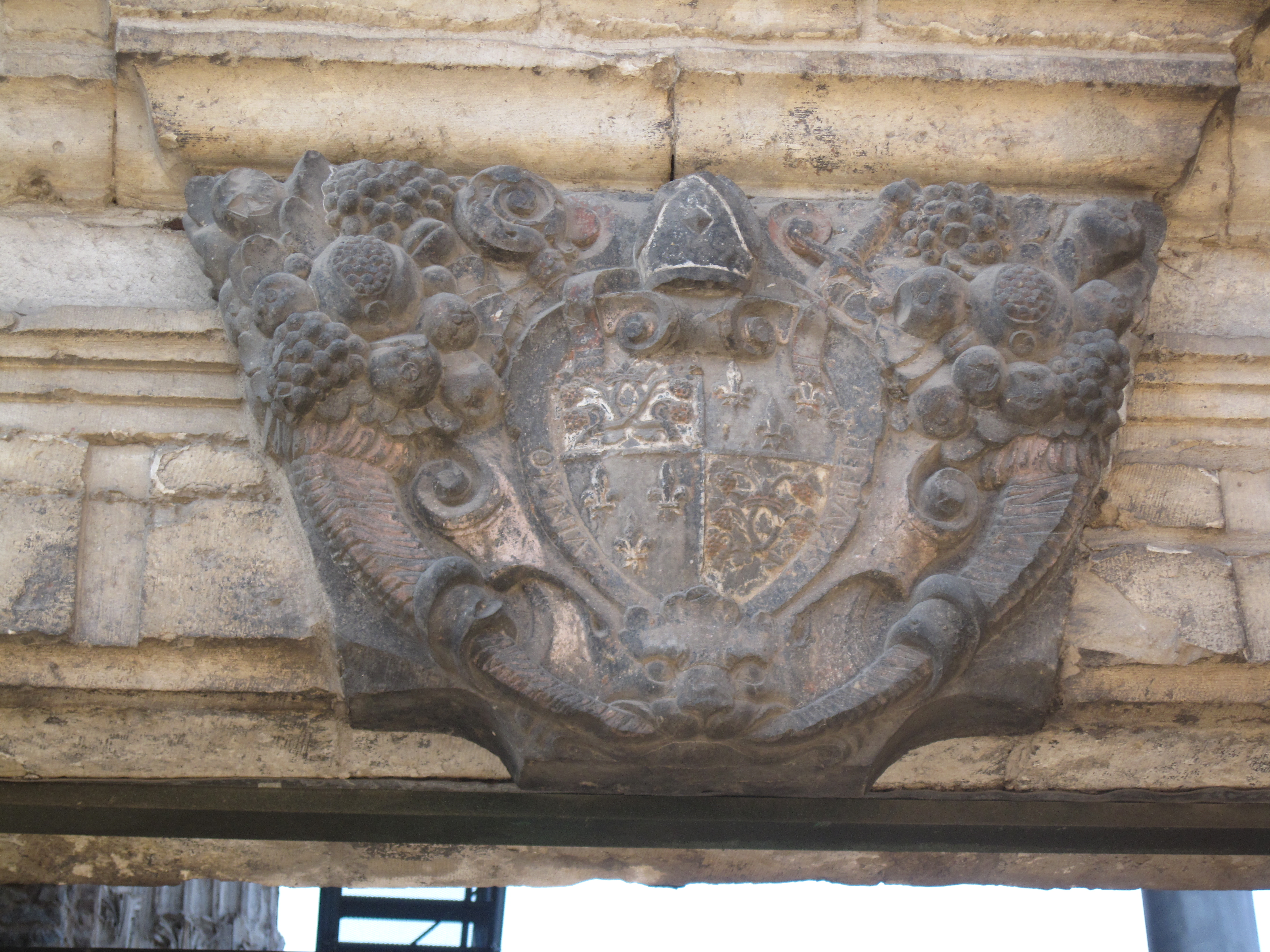 17de eeuw- Wapenschild, en leus OMNIA SUAVITER van abt Hubrecht van Sutendael. Blason et devise de l'abbé Hubrecht van Sutendael 17e siècle